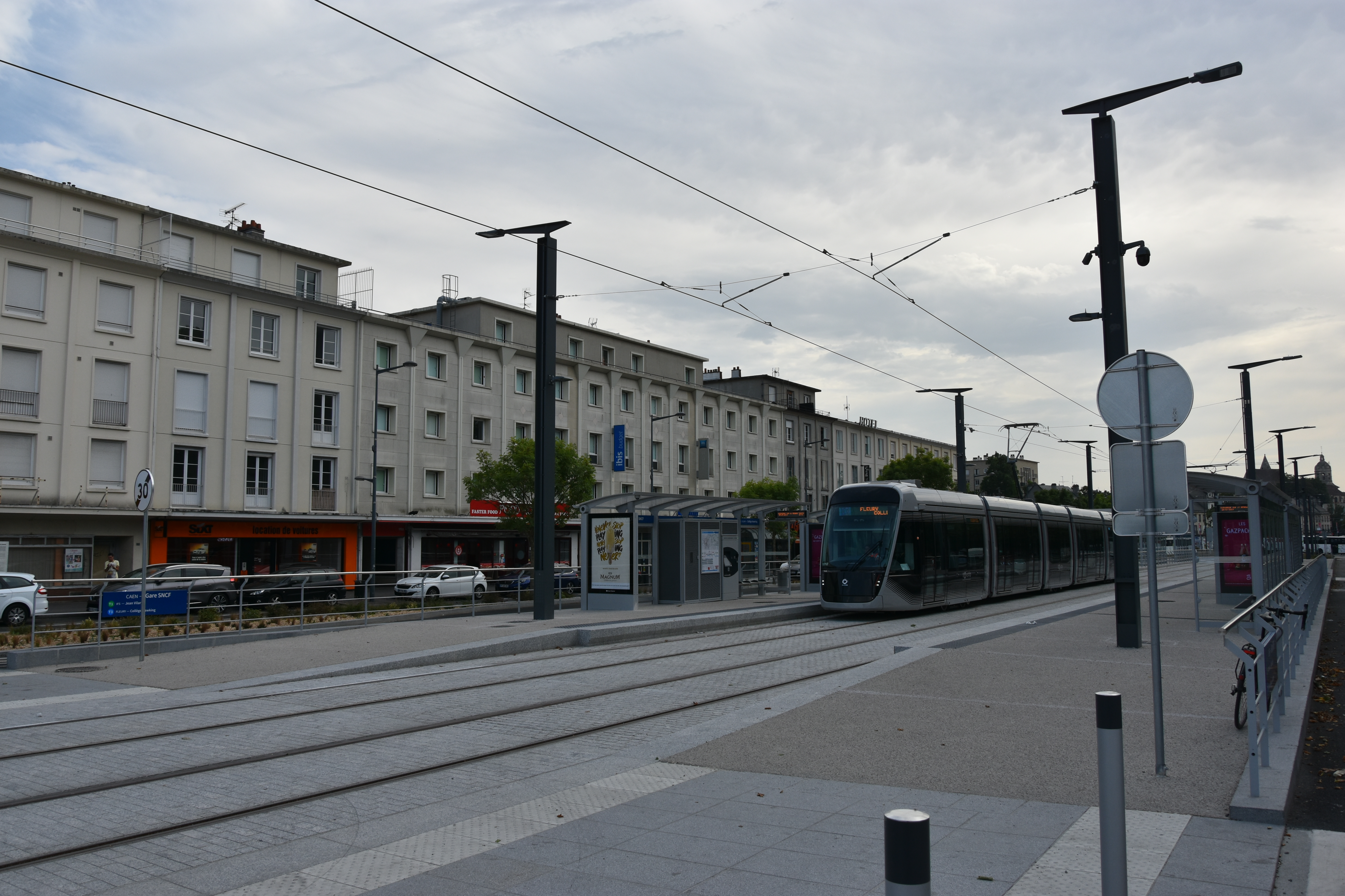 Tramwway de Caen à la station SNCF